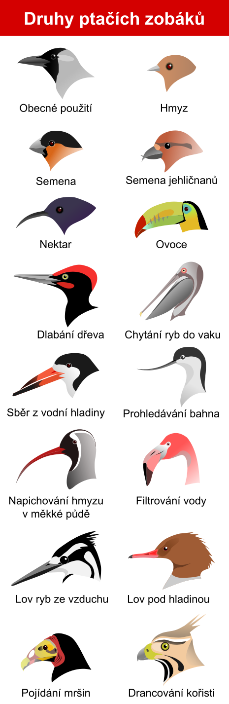 Druhy ptačích zobáků